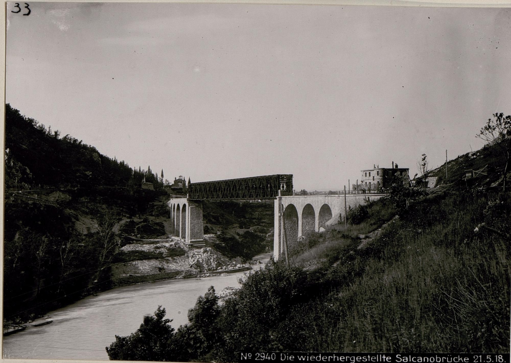 Die wiederhergestellte Salcanobrücke